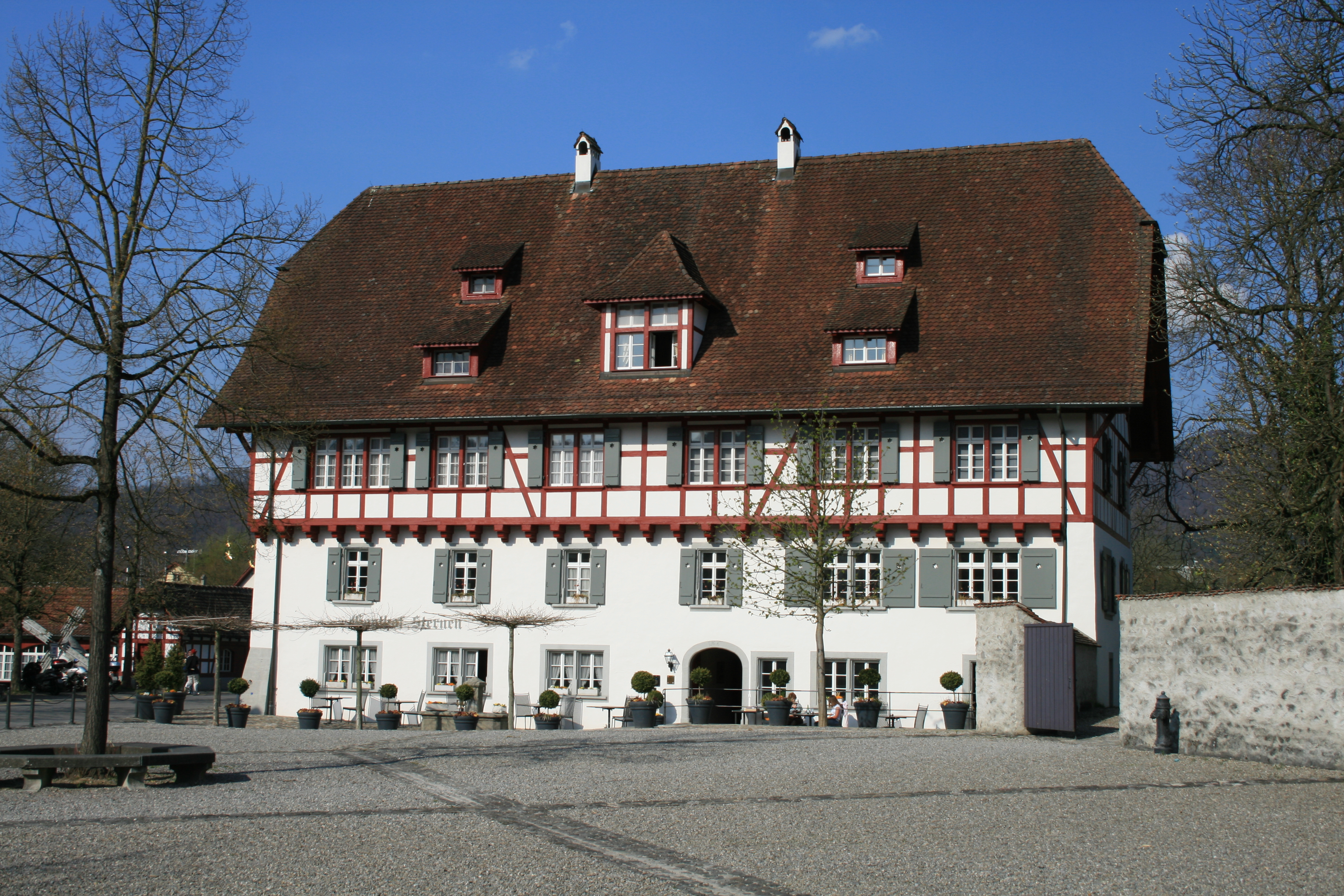 Gasthof Sternen, Kloster Wettingen, Schweiz